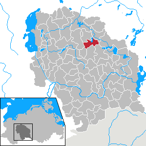 Hohen Pritz in Mecklenburg-Vorpommern - District Parchim